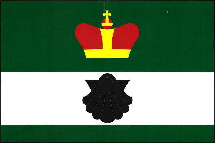 vlajka, Lutopecny, okres Kroměříž